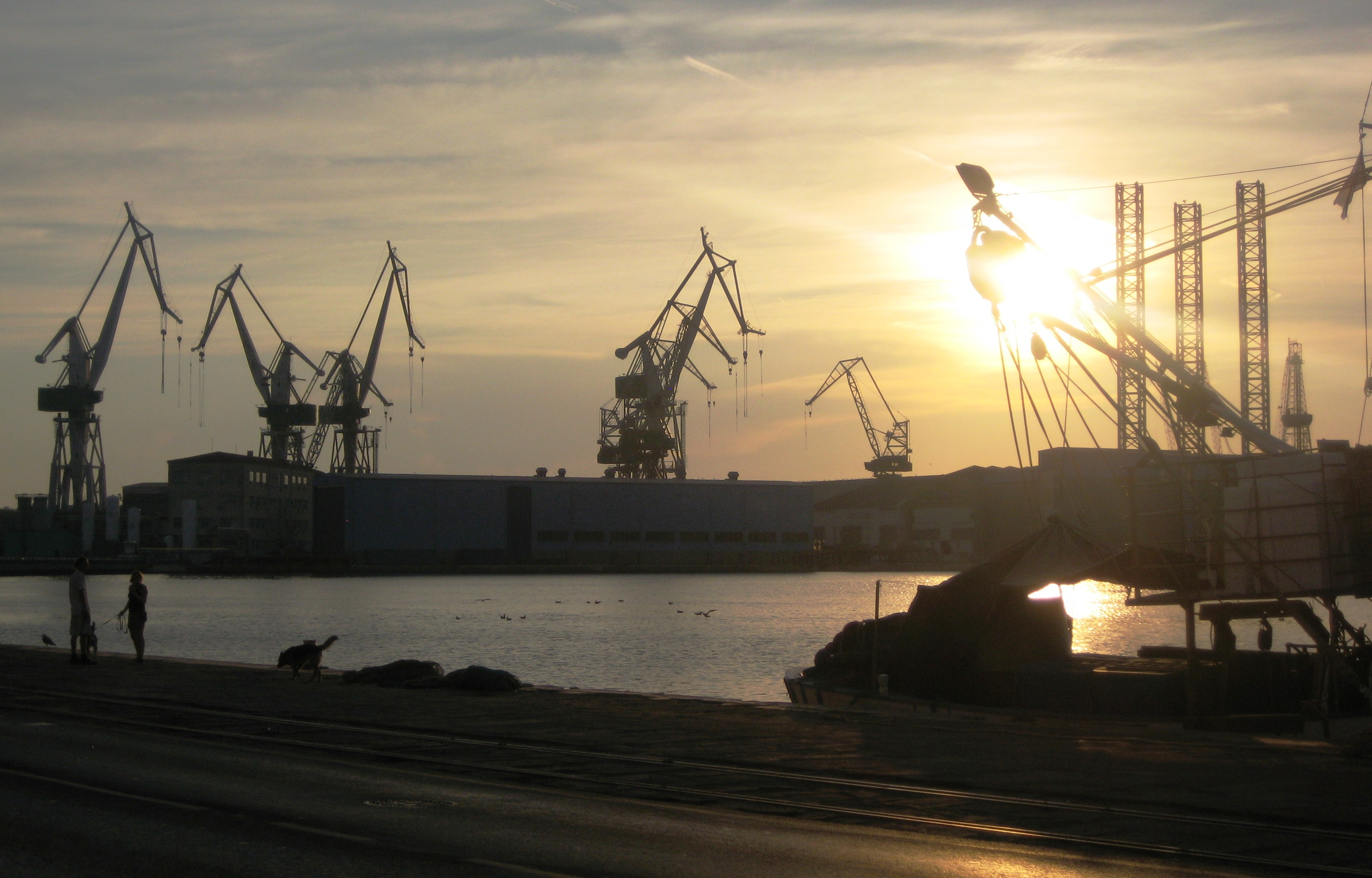 Hafen von Pula (HR)